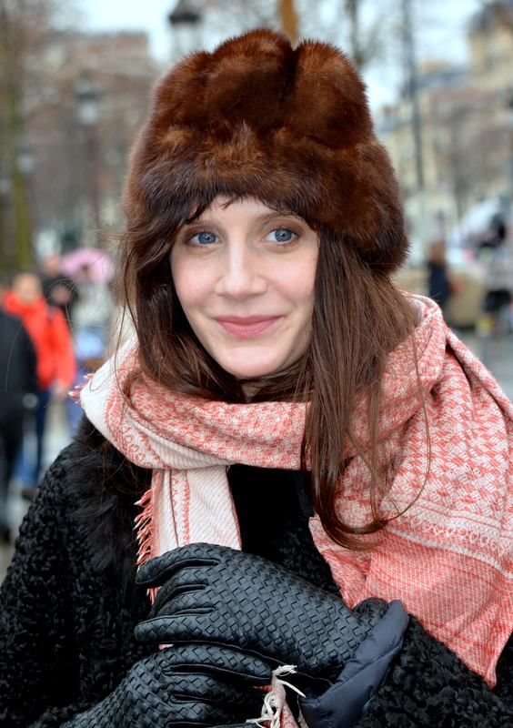 Judith Chemla au déjeuner des nommés des César du cinéma.